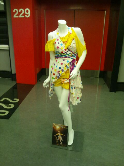 アニメロミックス Presents Minori Chihara Birthday Live 2012 supported by JOYSOUND 衣装展覧会より『Minori Chihara Live Tour 2011 〜Key for Defection〜』の衣装。